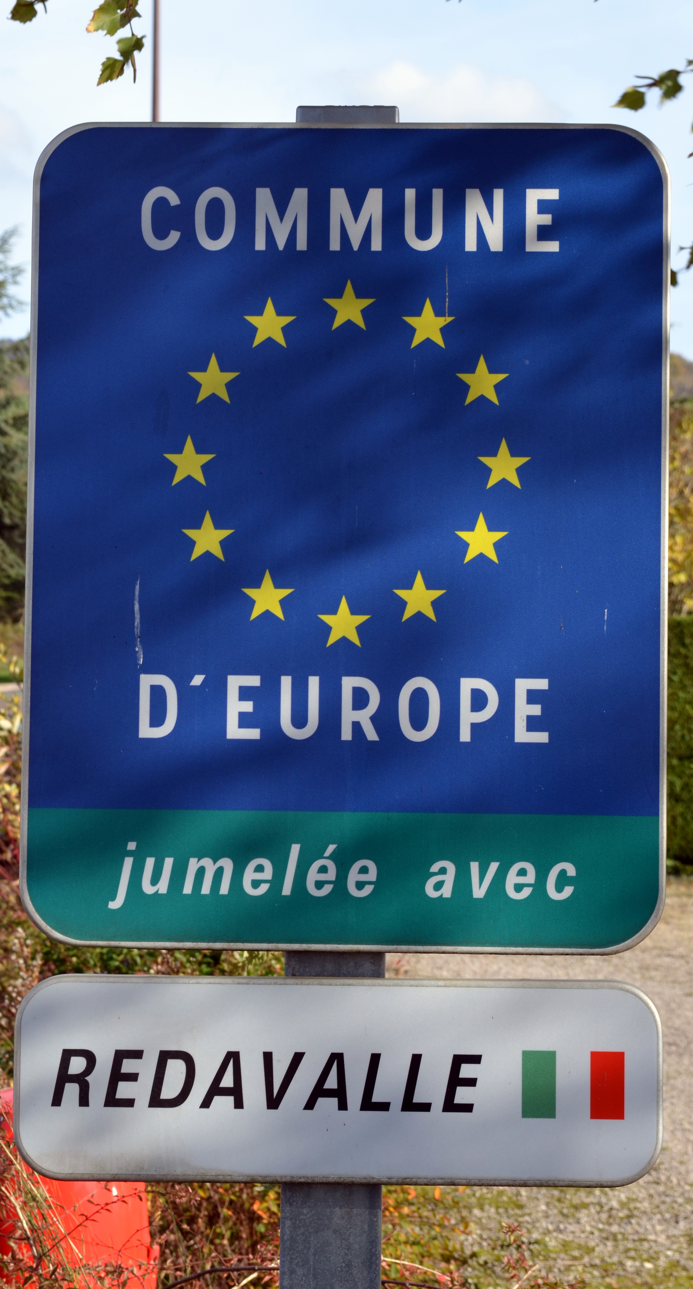 Photographie de Vaux-en-Bugey, Ain, France.